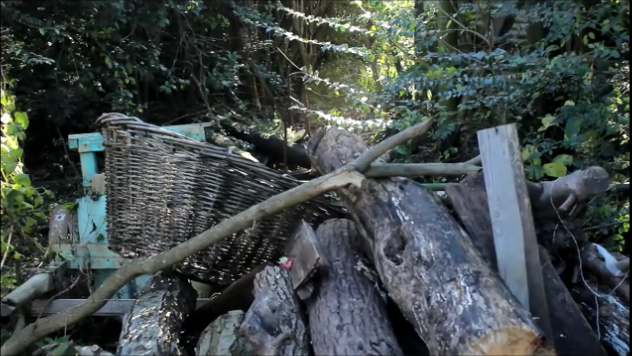 Foto donde se muestra un canasto de mimbre apoyado sobre troncos de madera y en su fondo árboles y un rayo de sol. Paisaje típico de la costa de Villa Domínico, Partido de Avellaneda, Provincia Buenos Aires. La cestería fue una actividad económica muy importante en la zona. Los canastos eran utilizados en la recolección de la cosecha evitando que se golpeen los frutos como: uvas y ciruelas. También la cestería se utilizó para forrar las damajuanas de manera artesanal.La tala de árboles fue importante para la construcción de viviendas realizando los pilares para evitar el ingreso del río en las crecidas, también se utilizó para la fabricación de toneles y para leña.La fotografía seleccionada permite observar en la parte central los troncos y el cesto de mimbre pero en su periferia se puede apreciar el verde de la vegetación